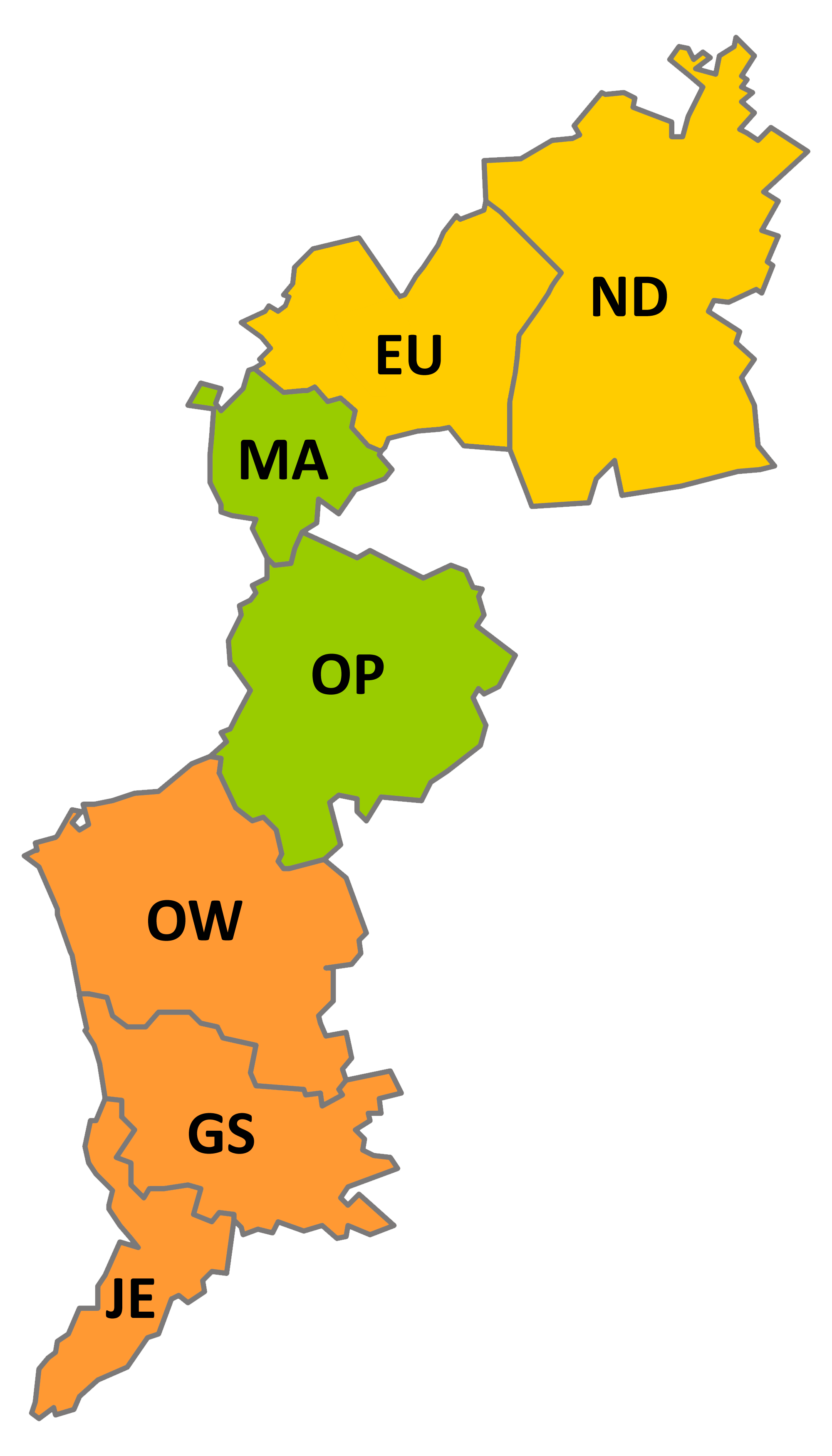 Übersicht über die Gruppen des Burgenländischen Fußballverbands